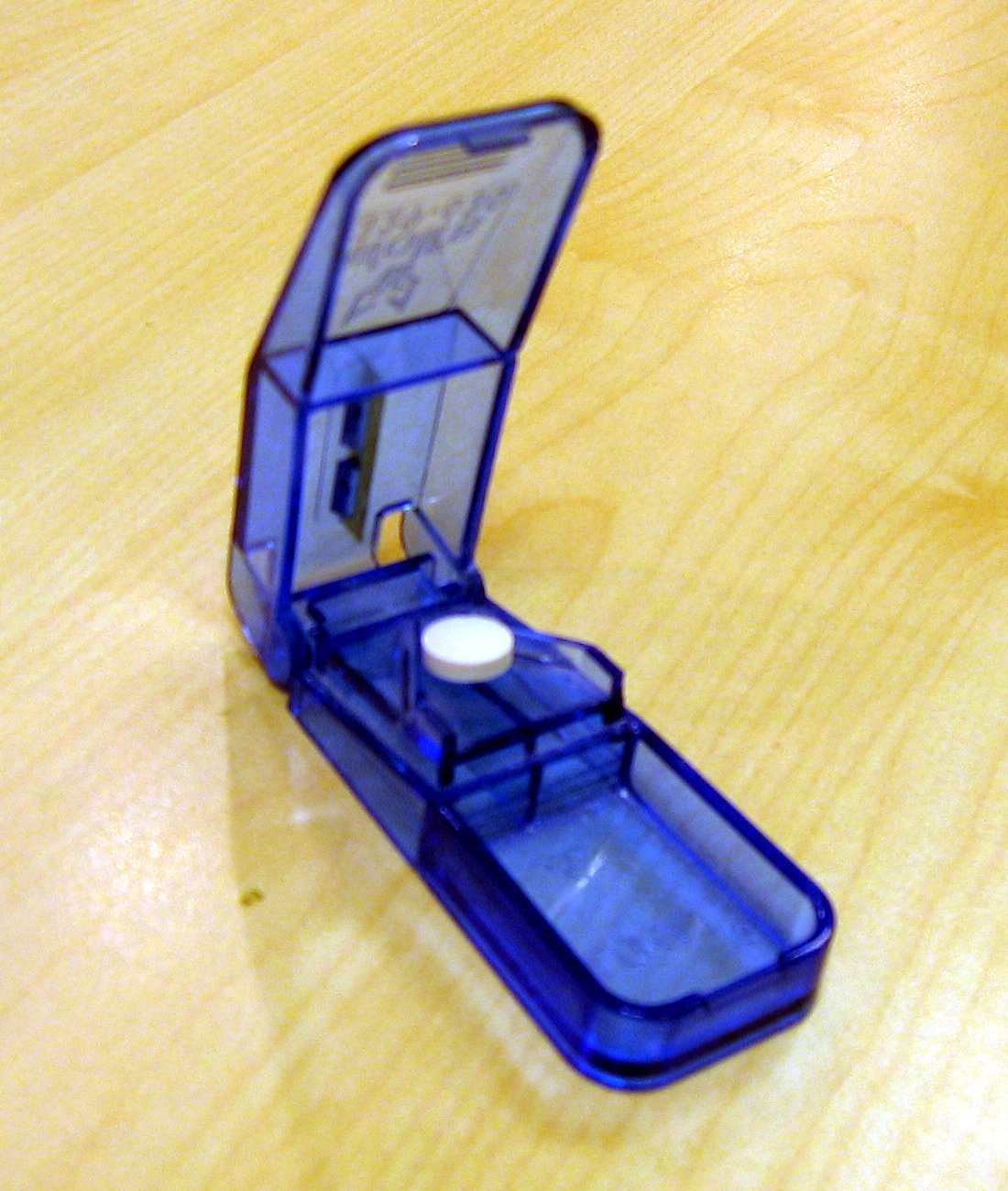 A pill splitter.